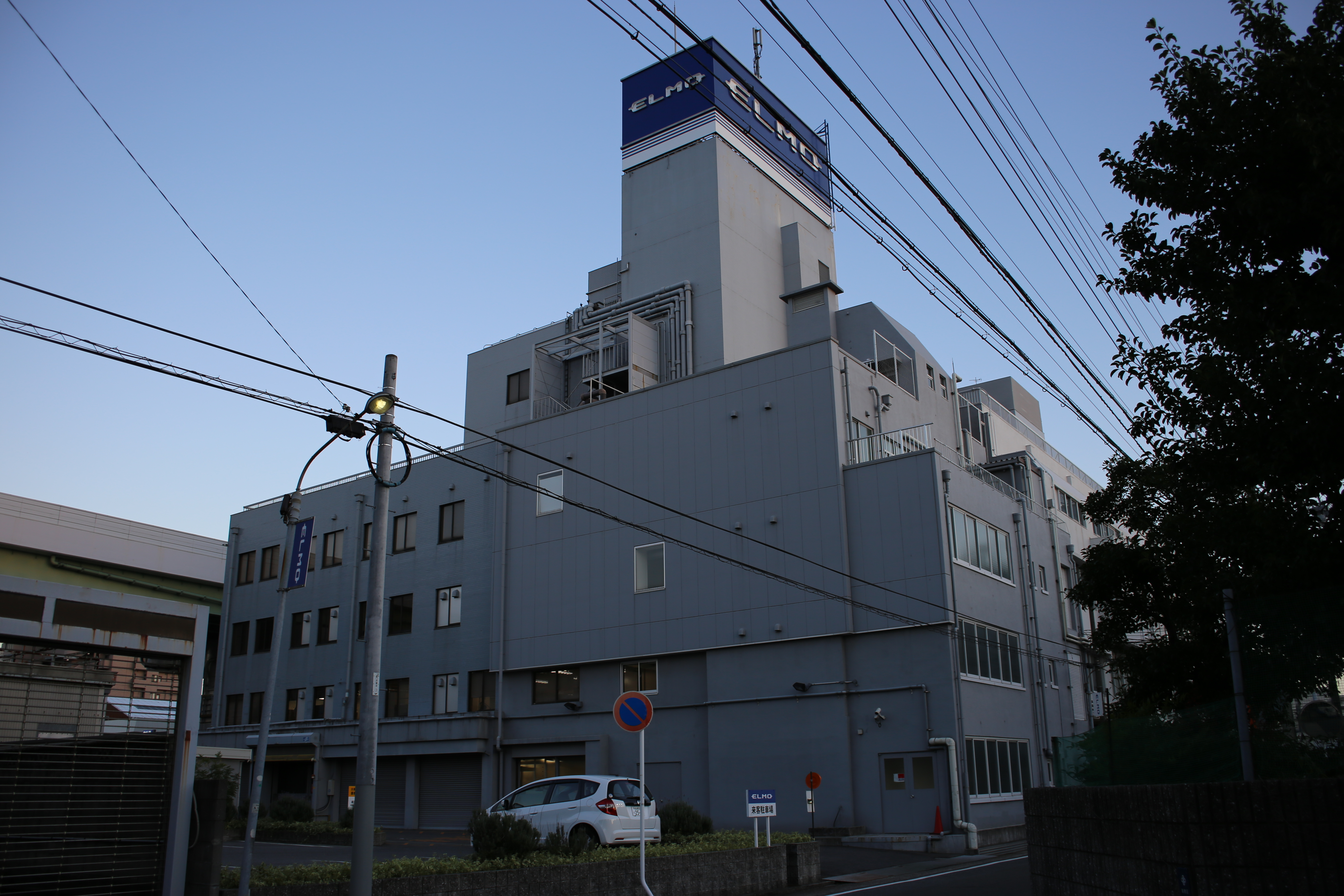 名古屋市瑞穂区明前町のエルモ社本社を西側公道北側より撮影